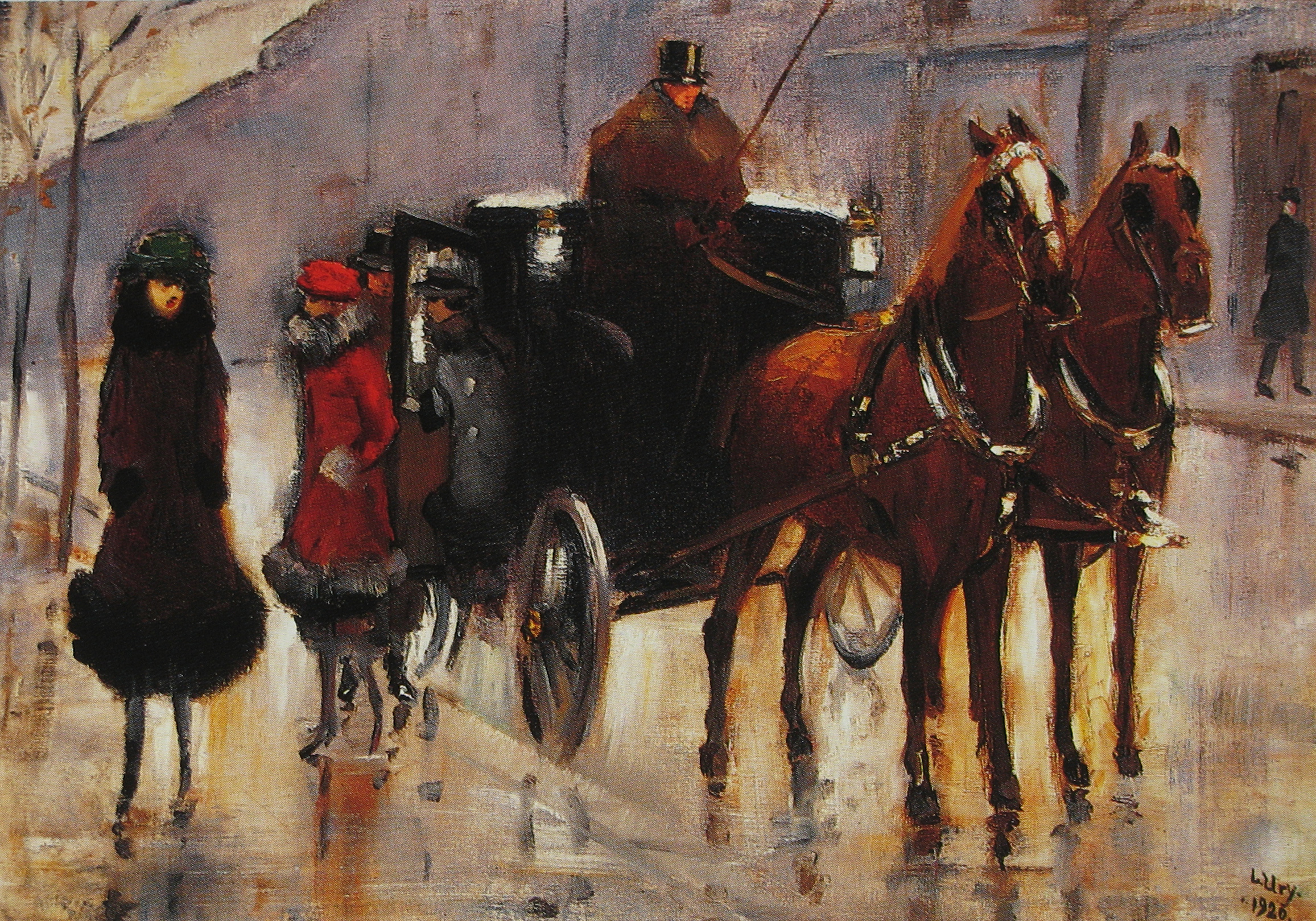 Lesser Ury: Damen, einer Droschke entsteigend (aus: Lesser Ury, Gebr. Mann Verlag)